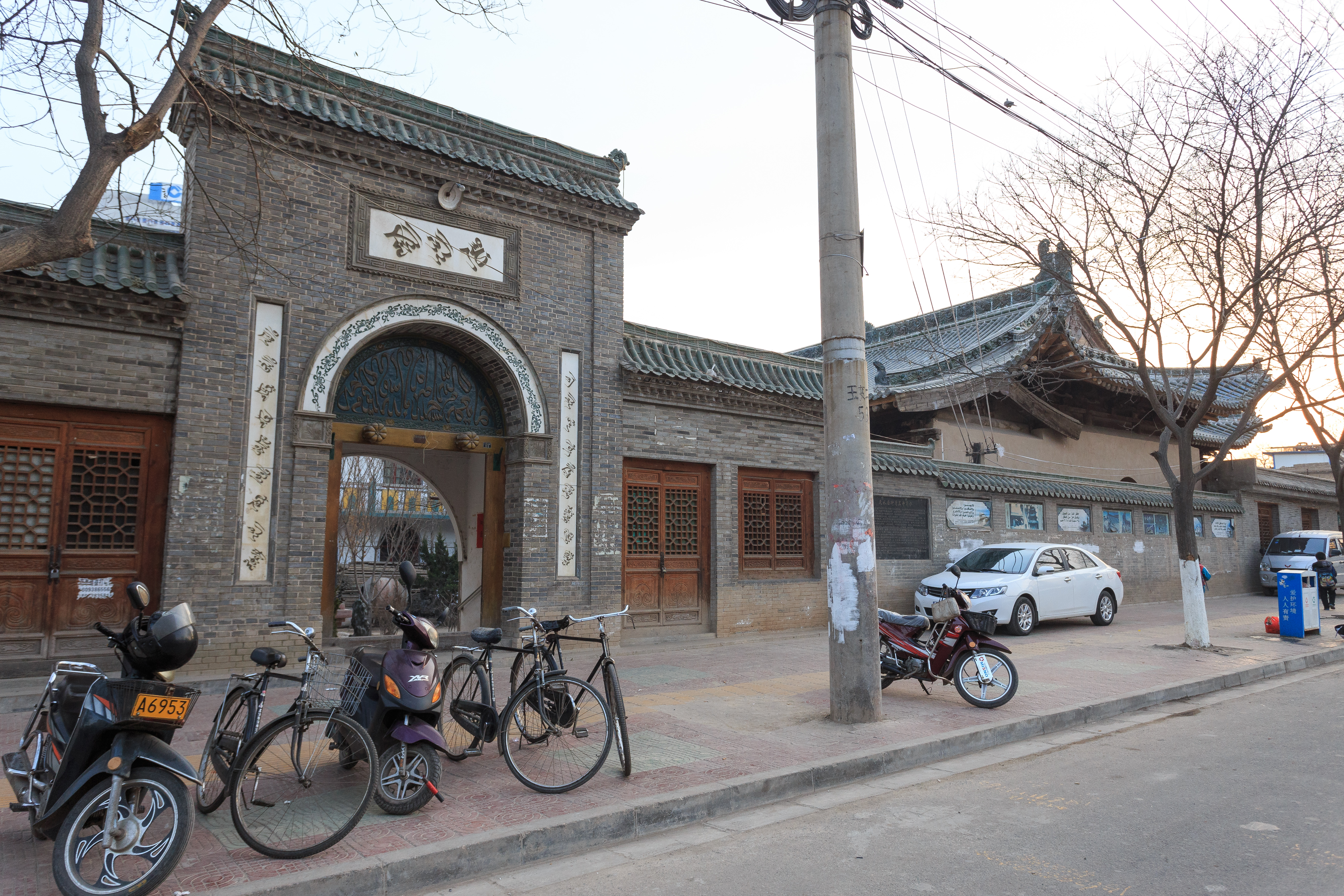 天水后街清真寺